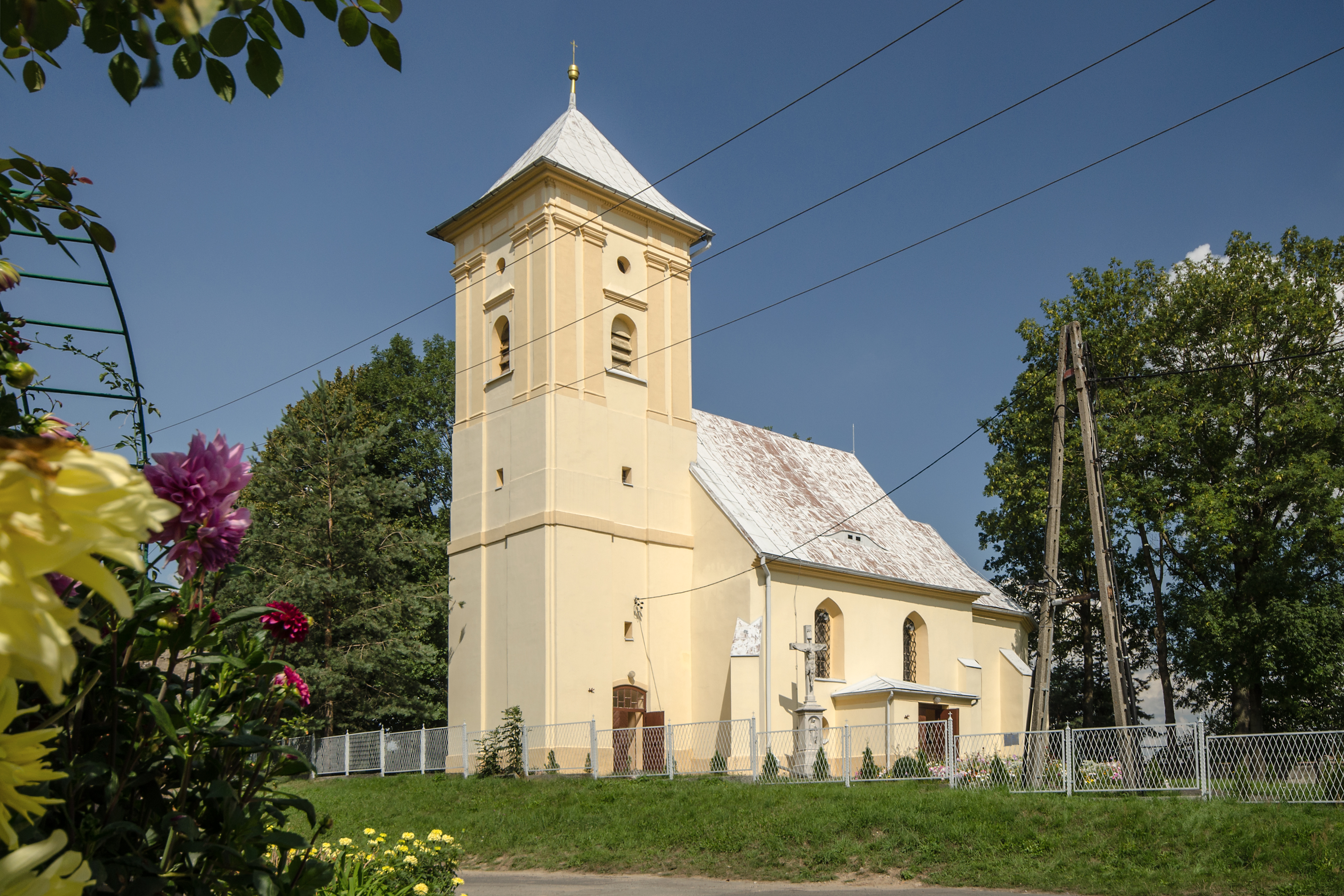 Tarnów Grodkowski - rzymskokatolicki kościół filialny p.w. św. Anny, XV, XIX